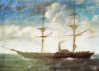 Buque de la Armada Peruana, comprado en 1844.